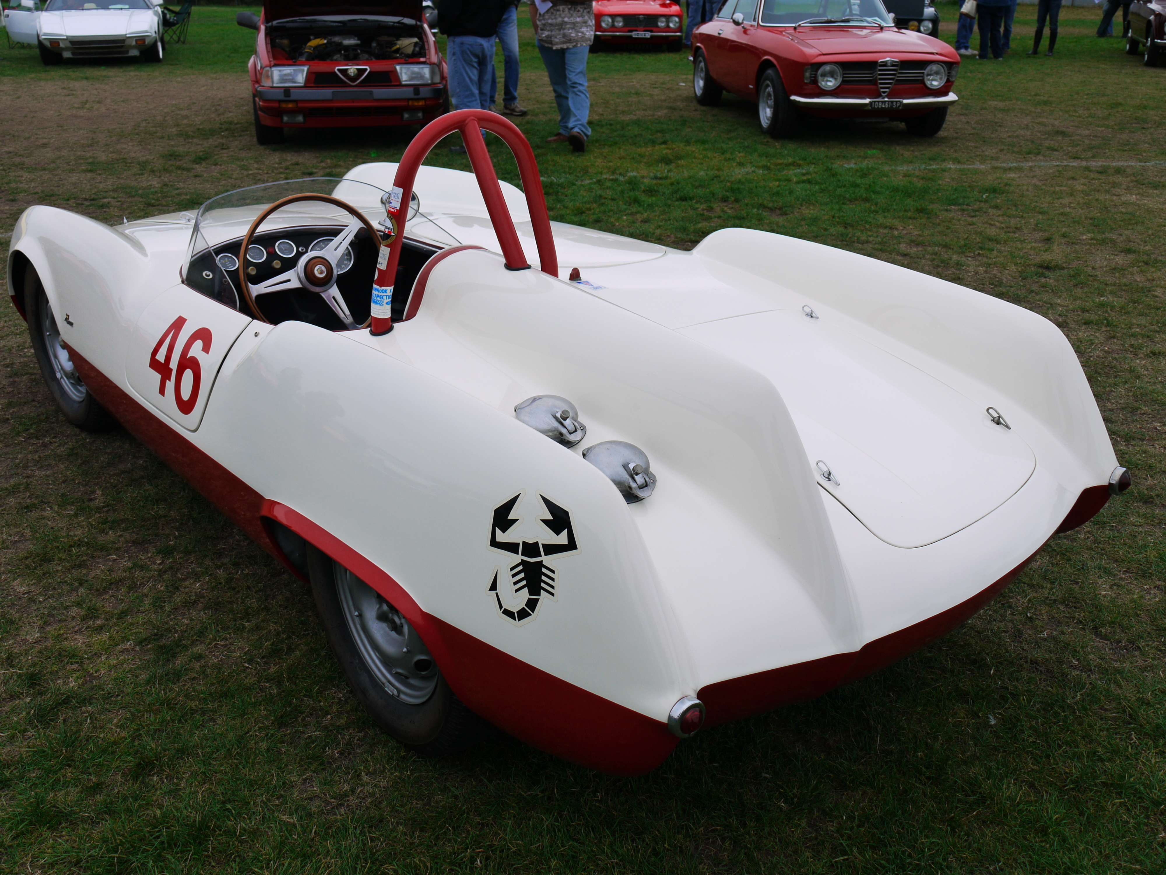 Abarth 207 A Boano Spider Corsa del 1955